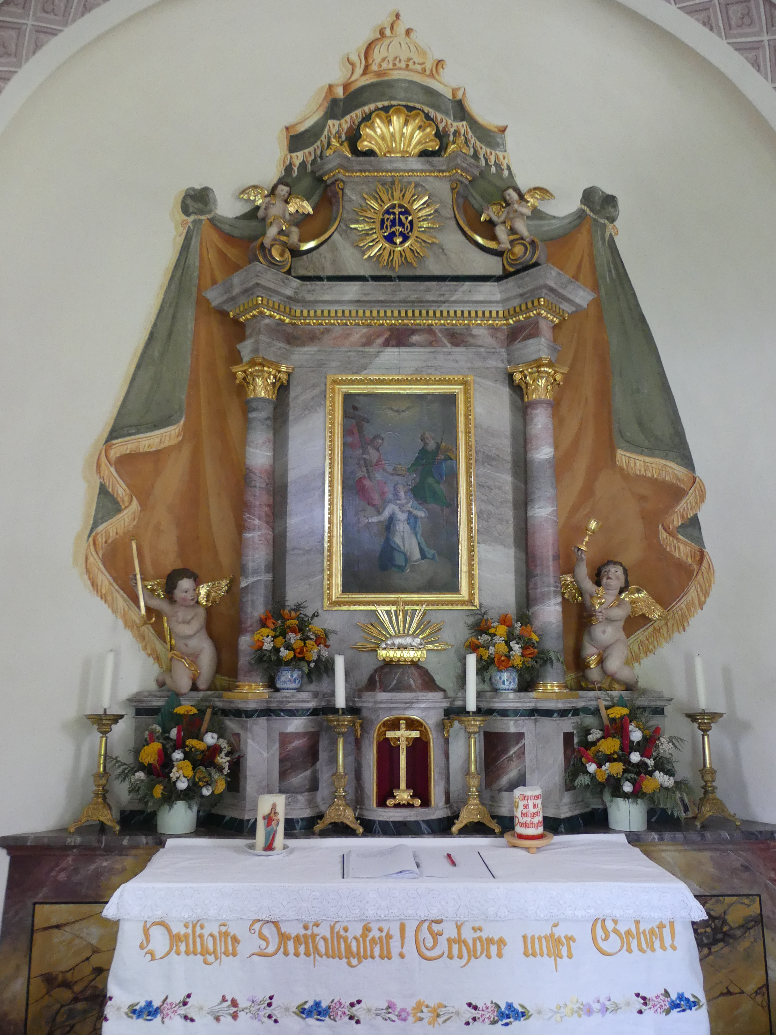 Altar in der Kapelle zur heiligen Dreifaltigkeit in Frohn in der österreichischen Gemeinde Lesachtal